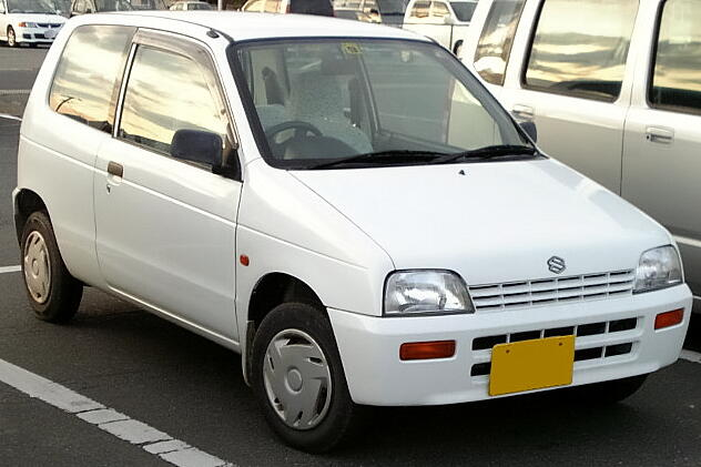 4代目スズキ・アルト（前期型）